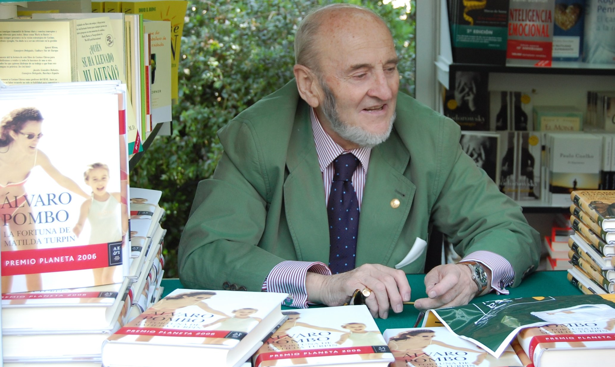 Alvaro Pombo